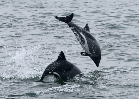 Heaviside-Delfine vor der Küste von Walvis Bay/ Namibia